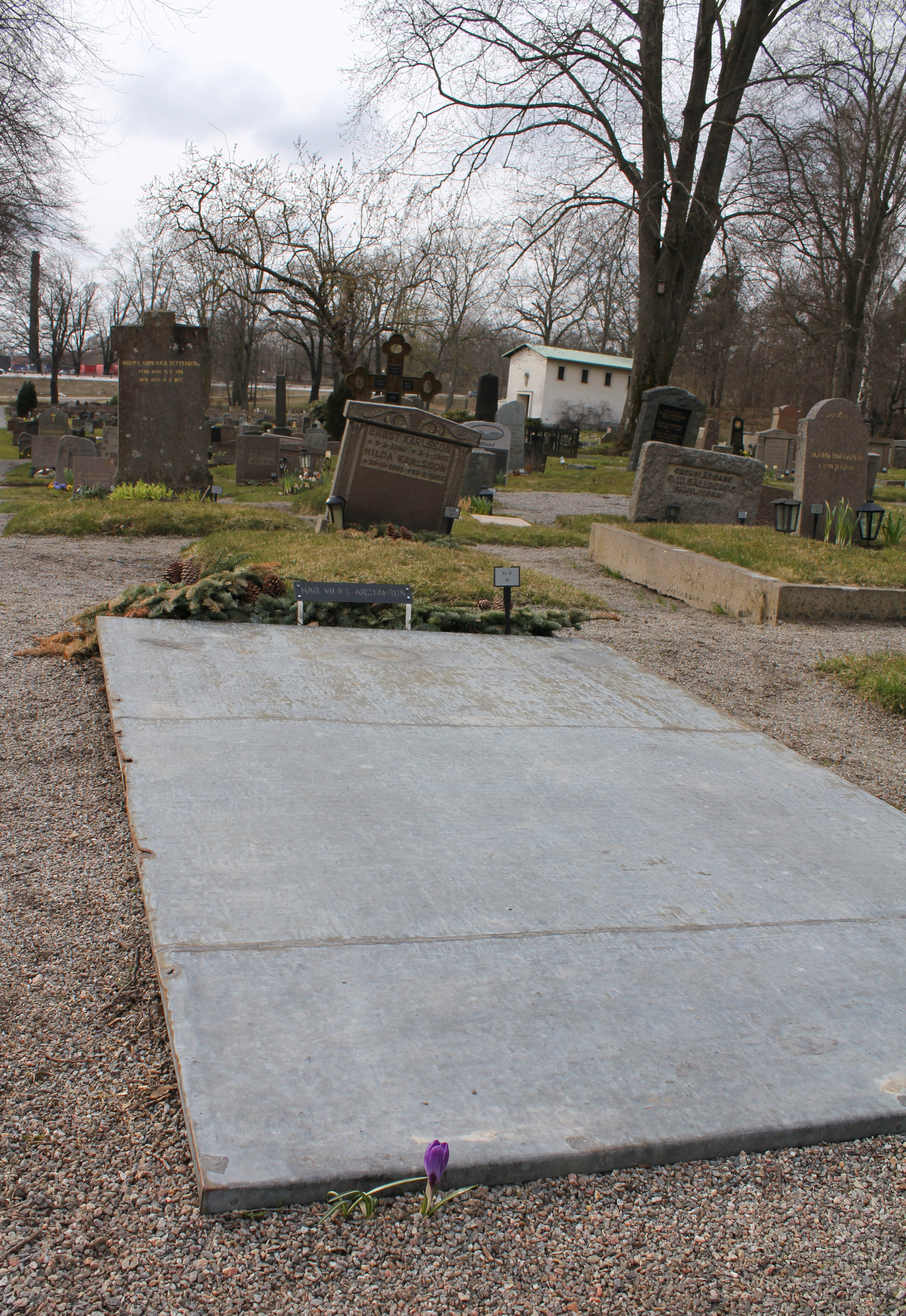 Märta Helena Reenstiernas ("Årstafrun") gravsten i Brännkyrka kyrka i stadsdelen Örby slott, Stockholm.